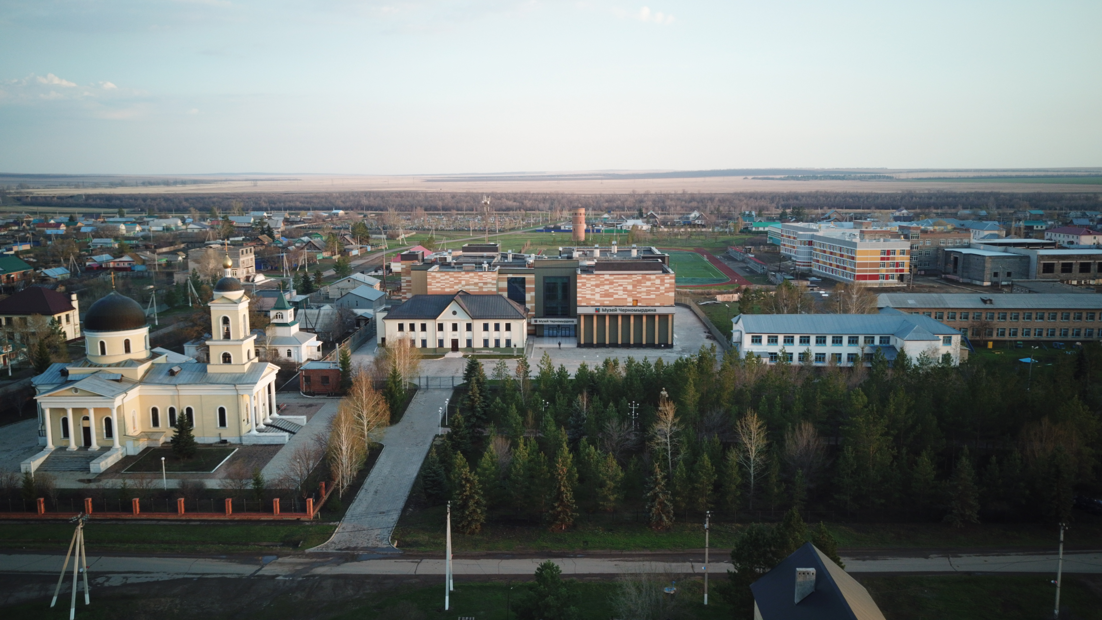 Фотография музея Черномырдина 2018 год